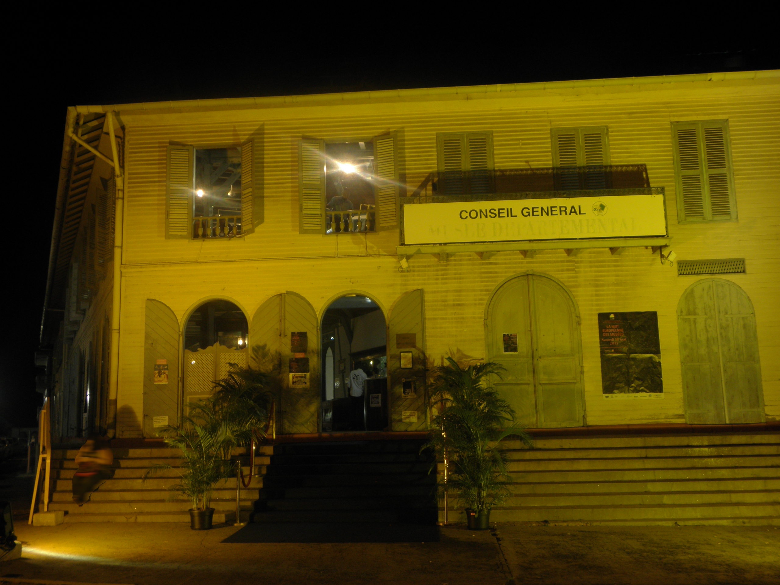 Entrée principale du musée lors de la Nuit des musées le samedi 18 mai 2013